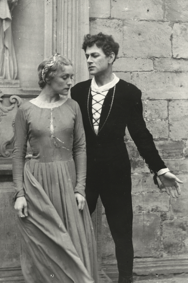 Hans Jacob Nilsen og Evy Engelsborg i Hamlet på Kronborg i 1946